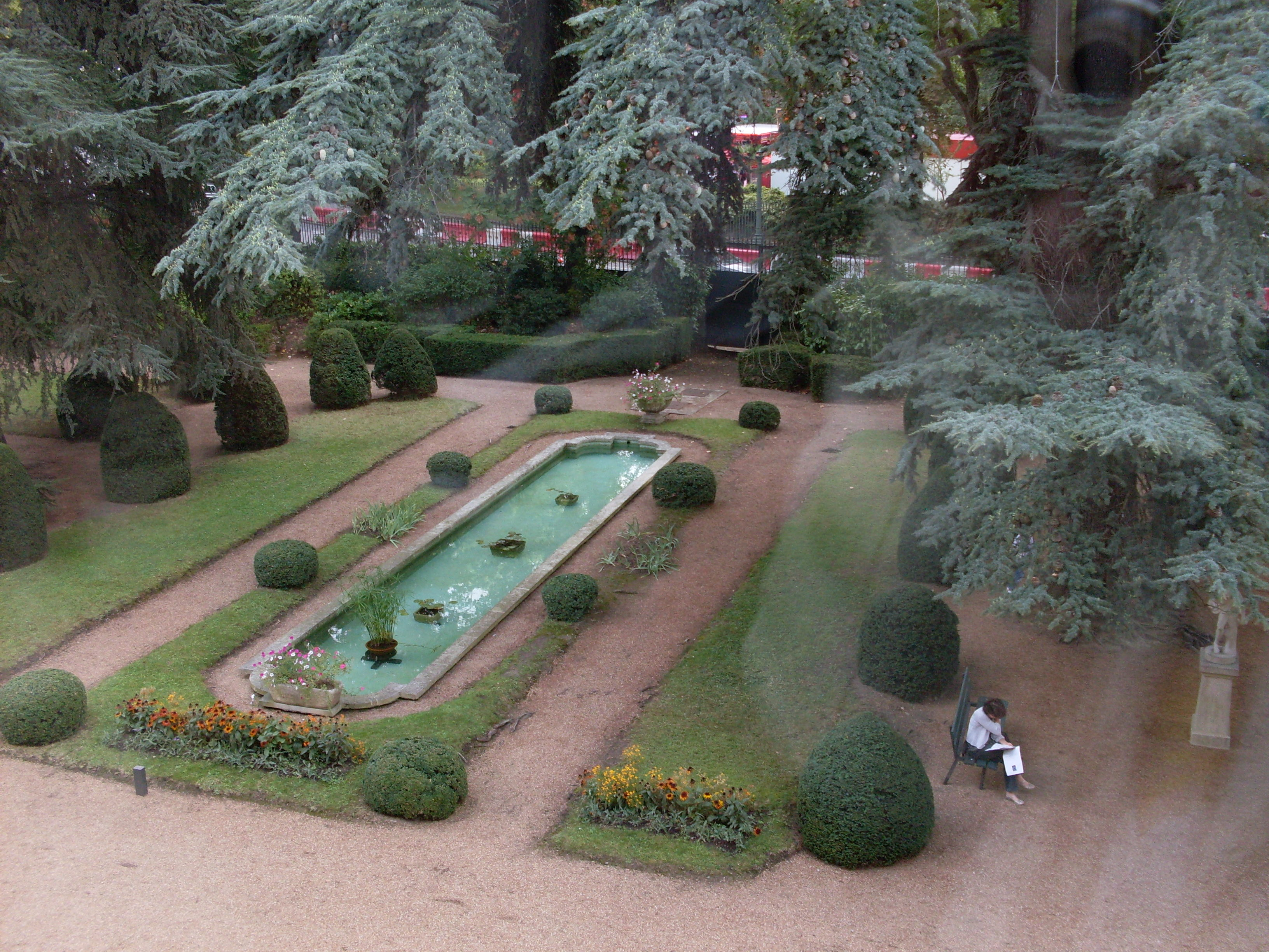 Le Palais Niel, commandement de l'armée de terre, jardin côté sud - Toulouse (Haute-Garonne, France).